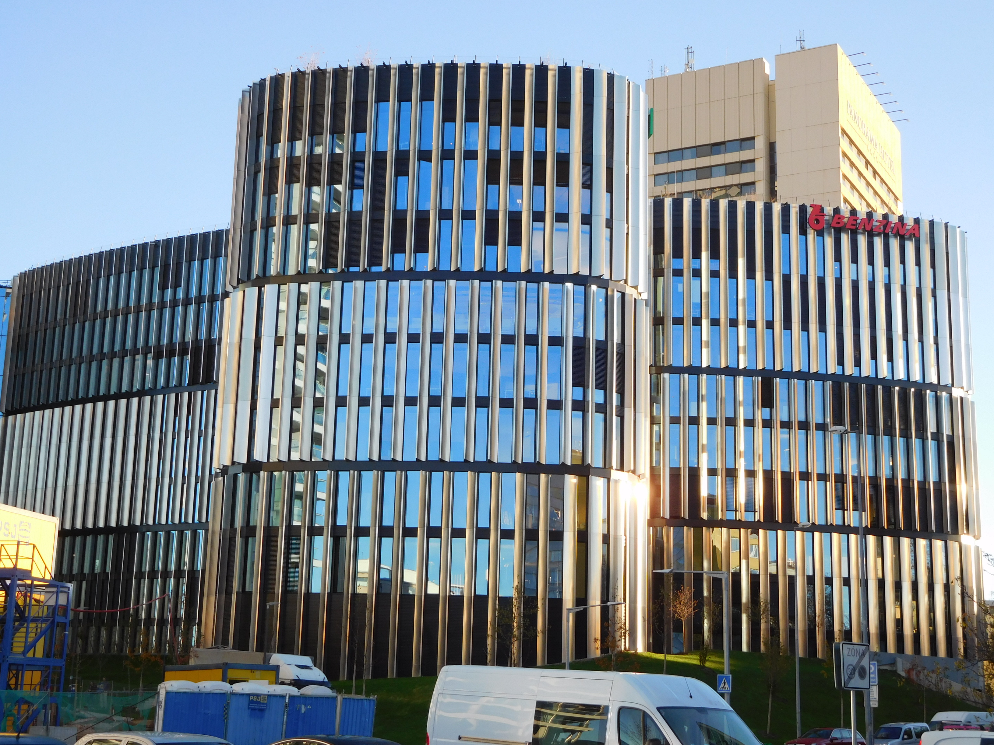 Praha - Pankrác, Milevská - Main Point Pankrác